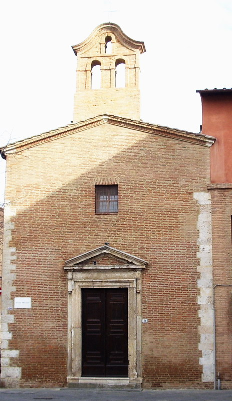 descrizione: la facciata della Chiesa dei Bigi a Grosseto, presso il Convento delle Clarisse lavoro personale di Vinattieri Matteo che lascia in pubblico dominio il 05/02/2007; foto digitale scattata nell'inverno 2006.